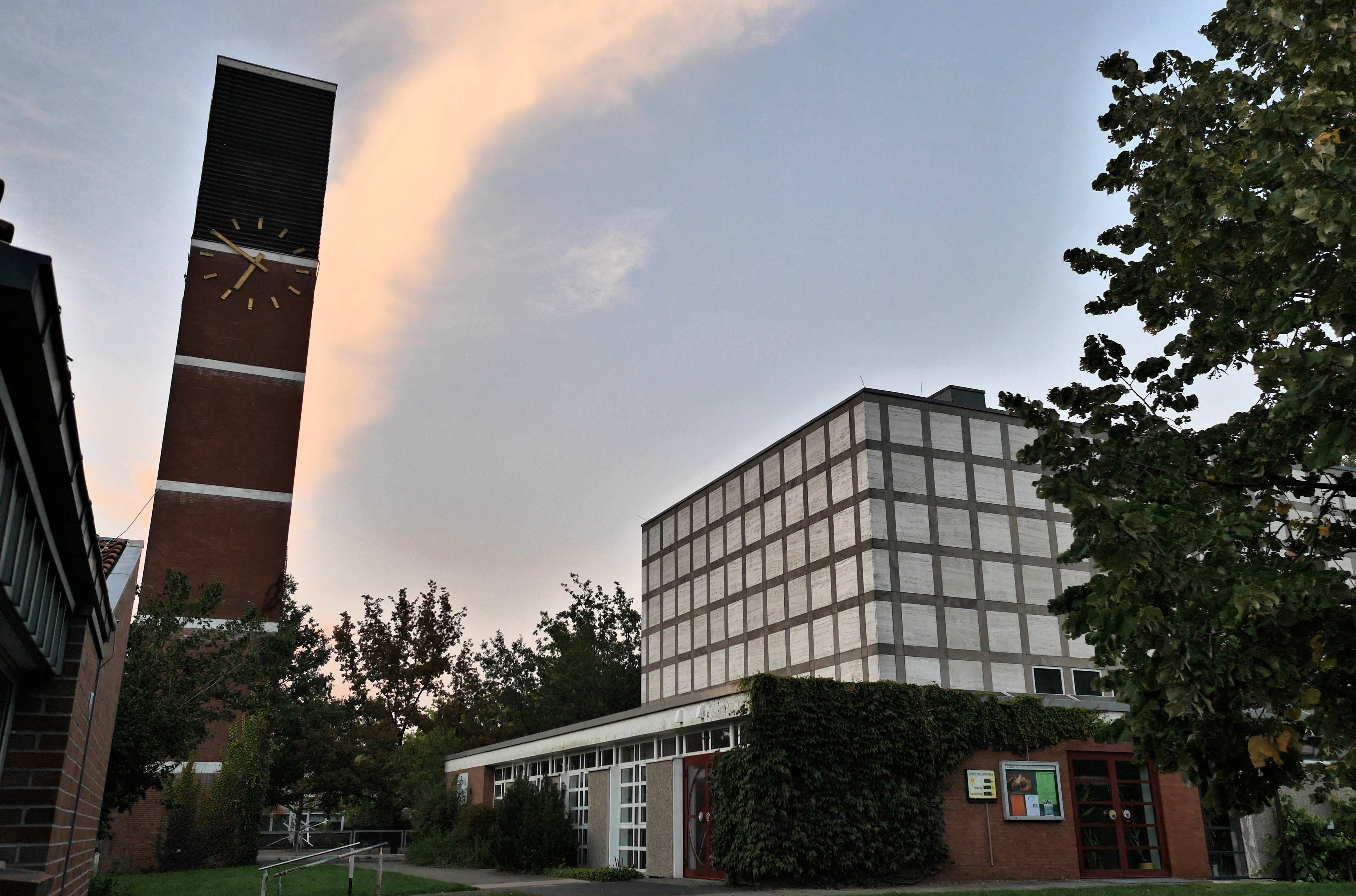 52.413002, 9.748799 Tituskirche-Vahrenheide Weimarer Allee 60